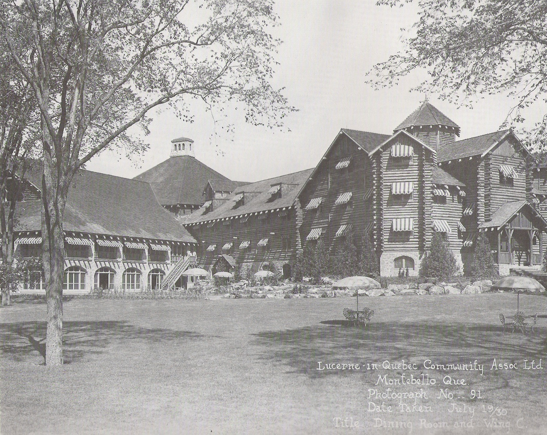 Chateau Montebello, Quebec, Canada.